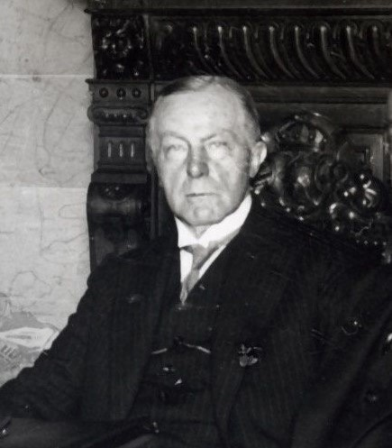 Simon de Graaff (1861-1953), Nederlands politicus